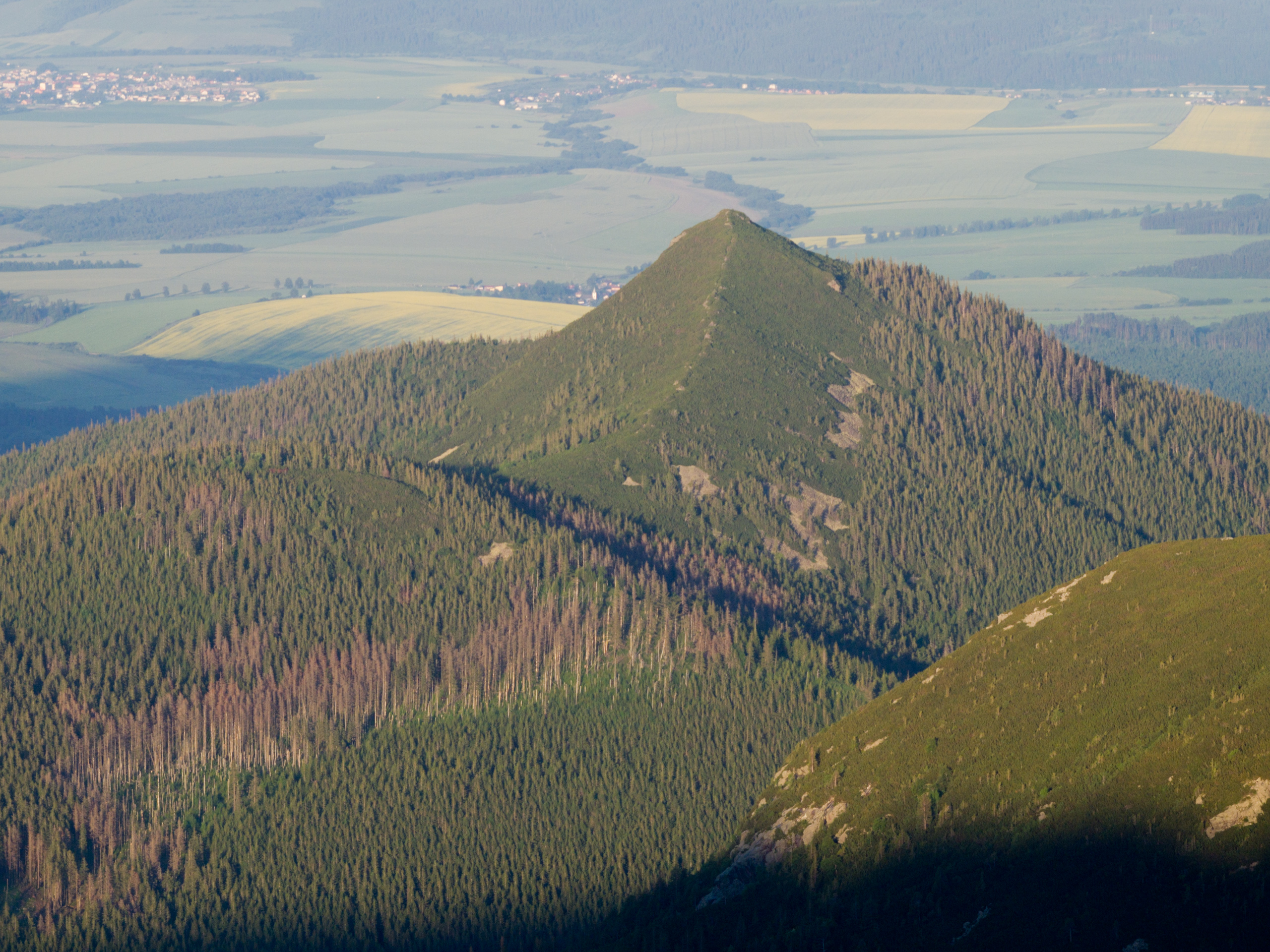 Steżki i Rynias – widok z Doliny Białych Stawów